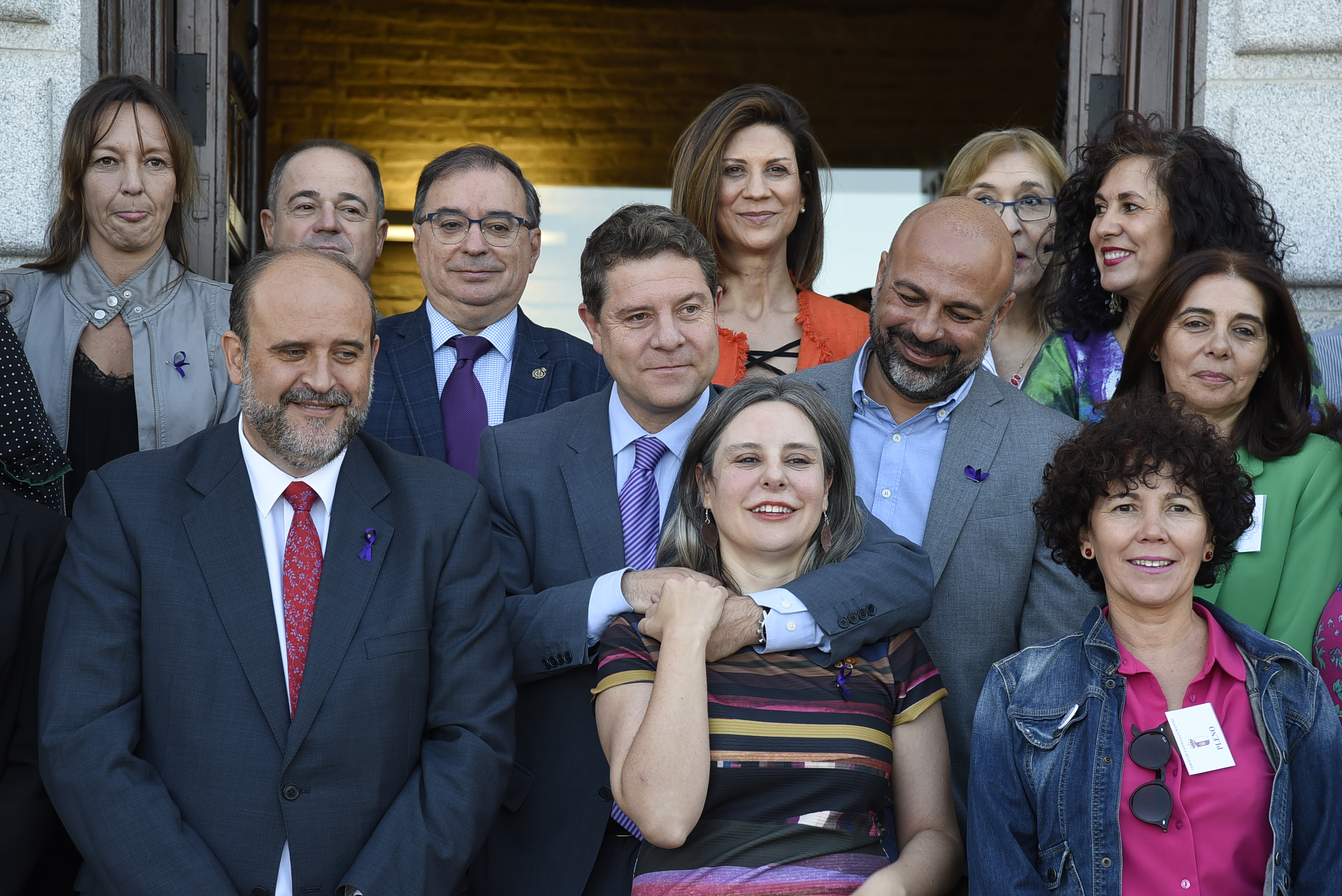 Toledo, 4 de octubre de 2018.- El presidente de Castilla-La Mancha, Emiliano García-Page, posa junto a la directora del Instituto de la Mujer, Araceli Martínez, diputados y diputadas regionales, y representantes de las asociaciones de mujeres, tras la aprobación en el Pleno de las Cortes regionales, del Proyecto de Ley para una Sociedad Libre de Violencia de Género en Castilla-La Mancha. (Fotos: José Ramón Márquez // JCCM)